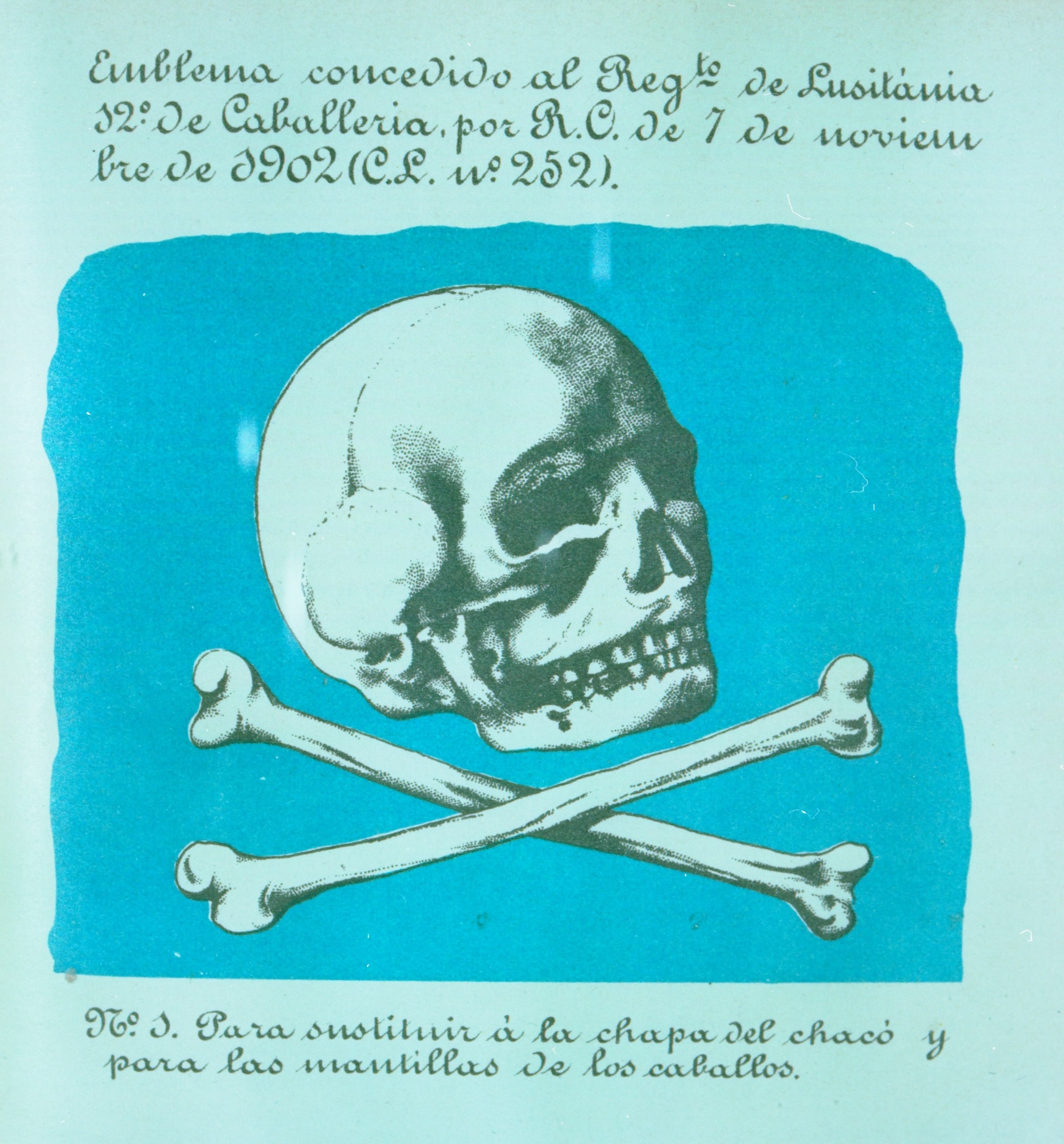 Emblema para sustituir a la chapa del chacó y para las mantillas de los caballos del Regimiento ce Caballería «Lusitanía», con una calavera y dos tibias cruzadas, de metal